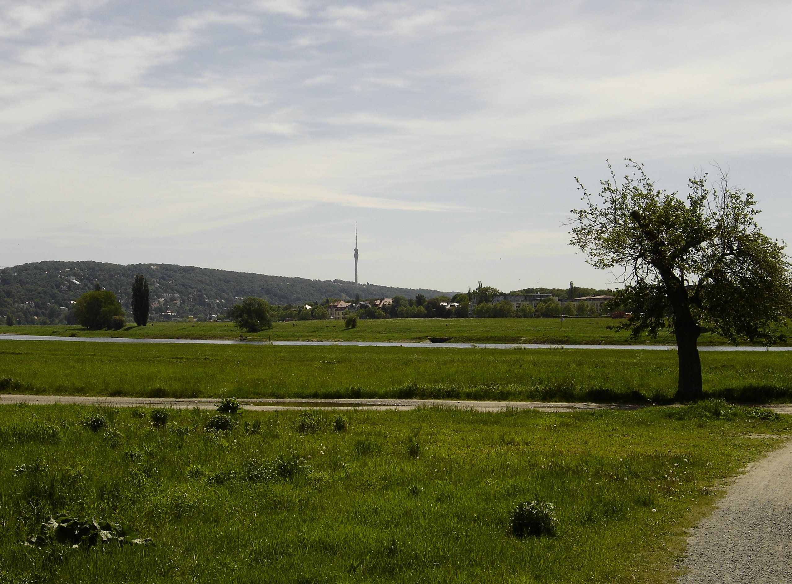 elbe at Waldschlösschen in Dresden